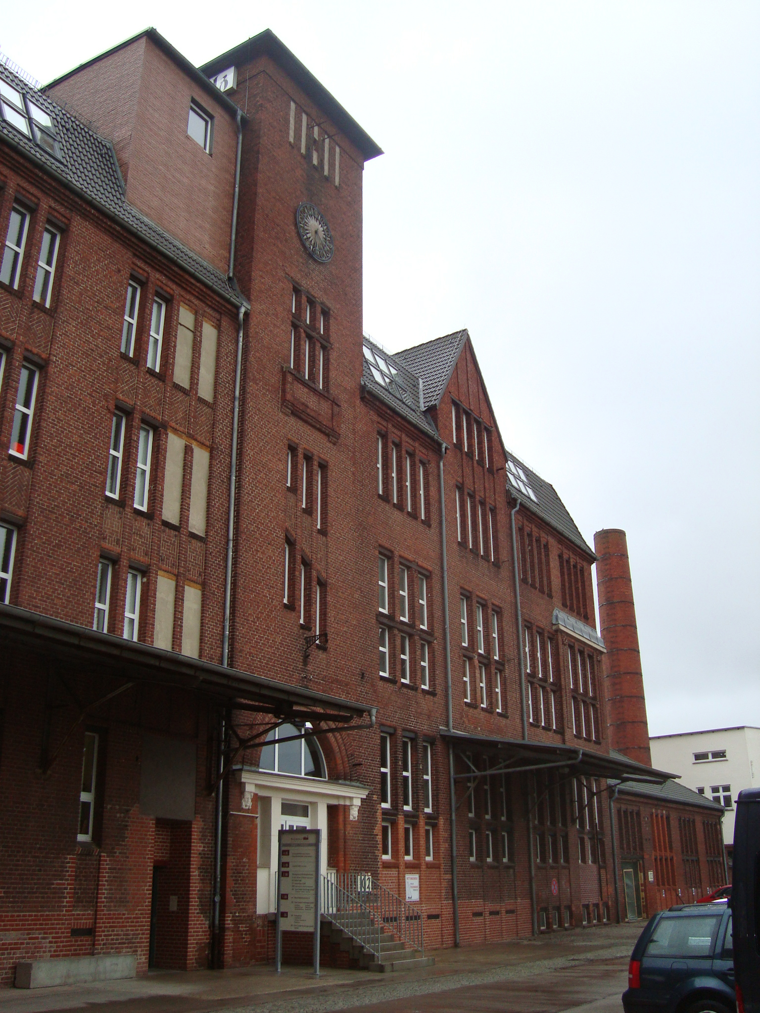 Hofansicht der Biomalzfabrik Teltow